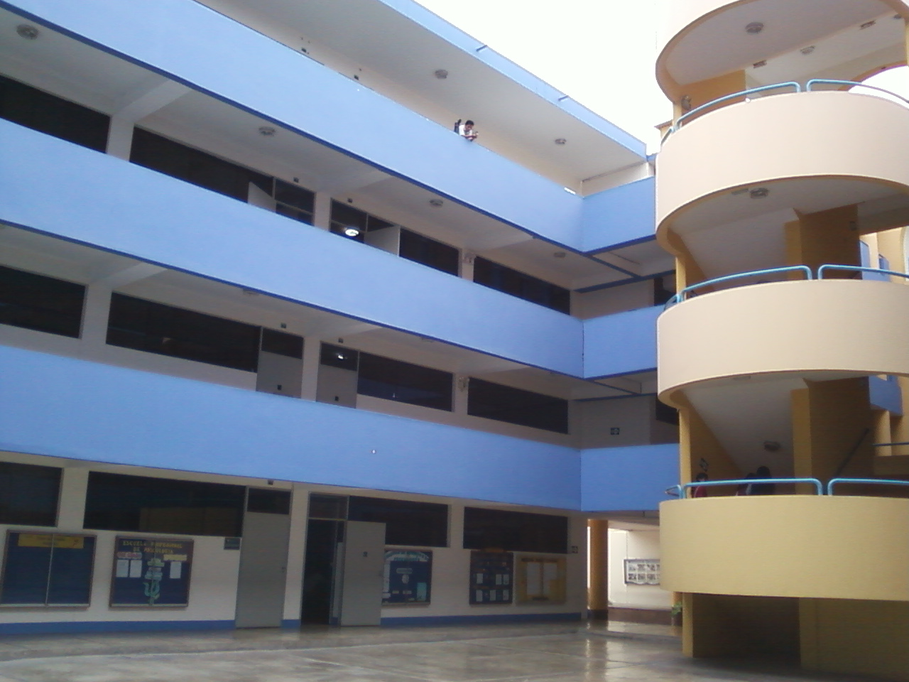 Una vista del pabellón A de la Universidad San Pedro, campus Los Pinos en Chimbote, Perú.